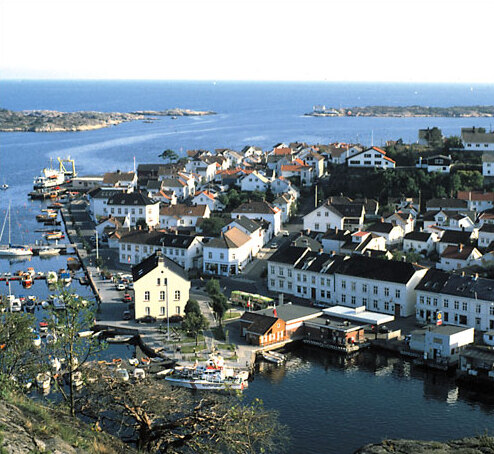 Risør by